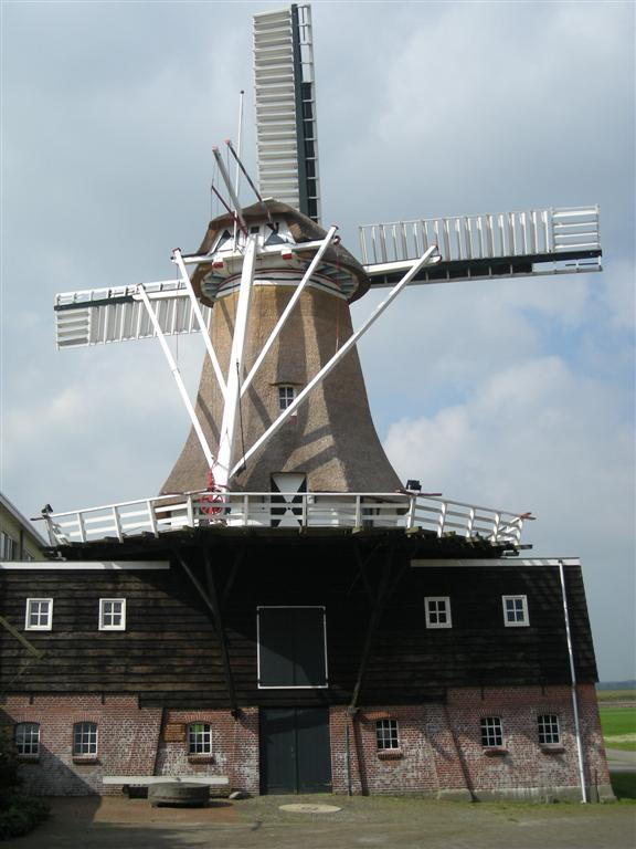 Weyert, windmolen in Makkinga